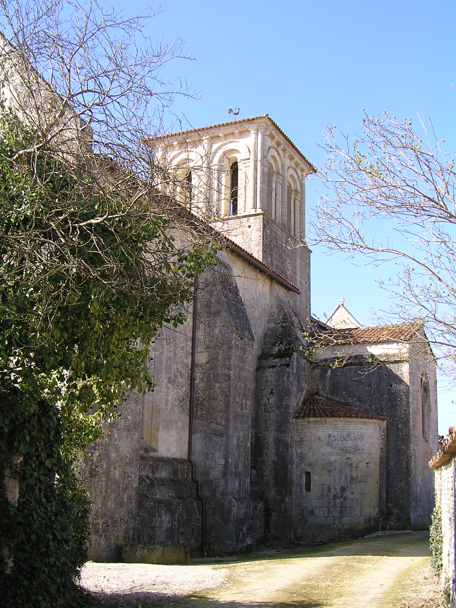 église de Haimps